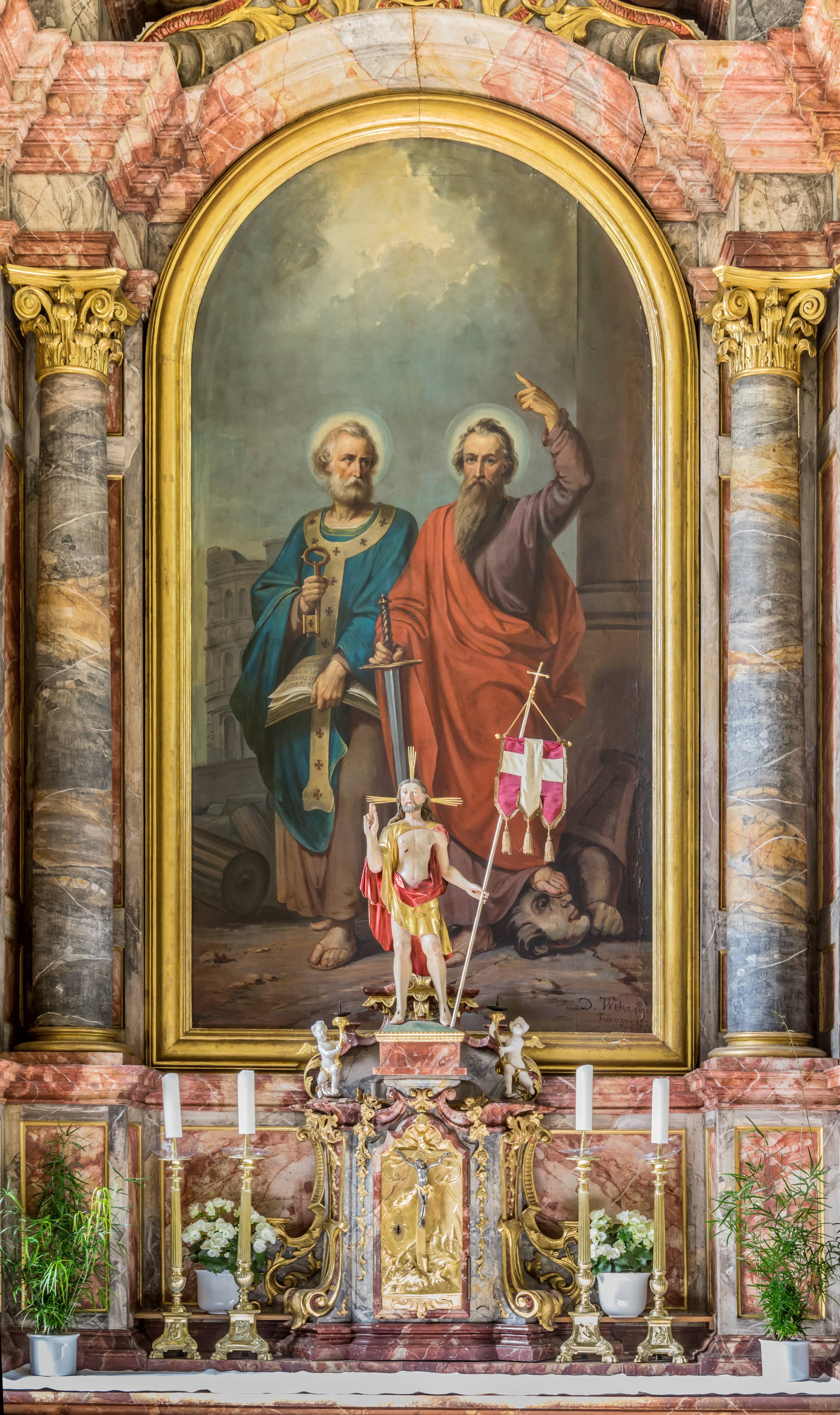 Bilder aus Freiburg von der Kirche St.Peter und Paul in Freiburg Kappel Hochaltarbild von Dominik Weber